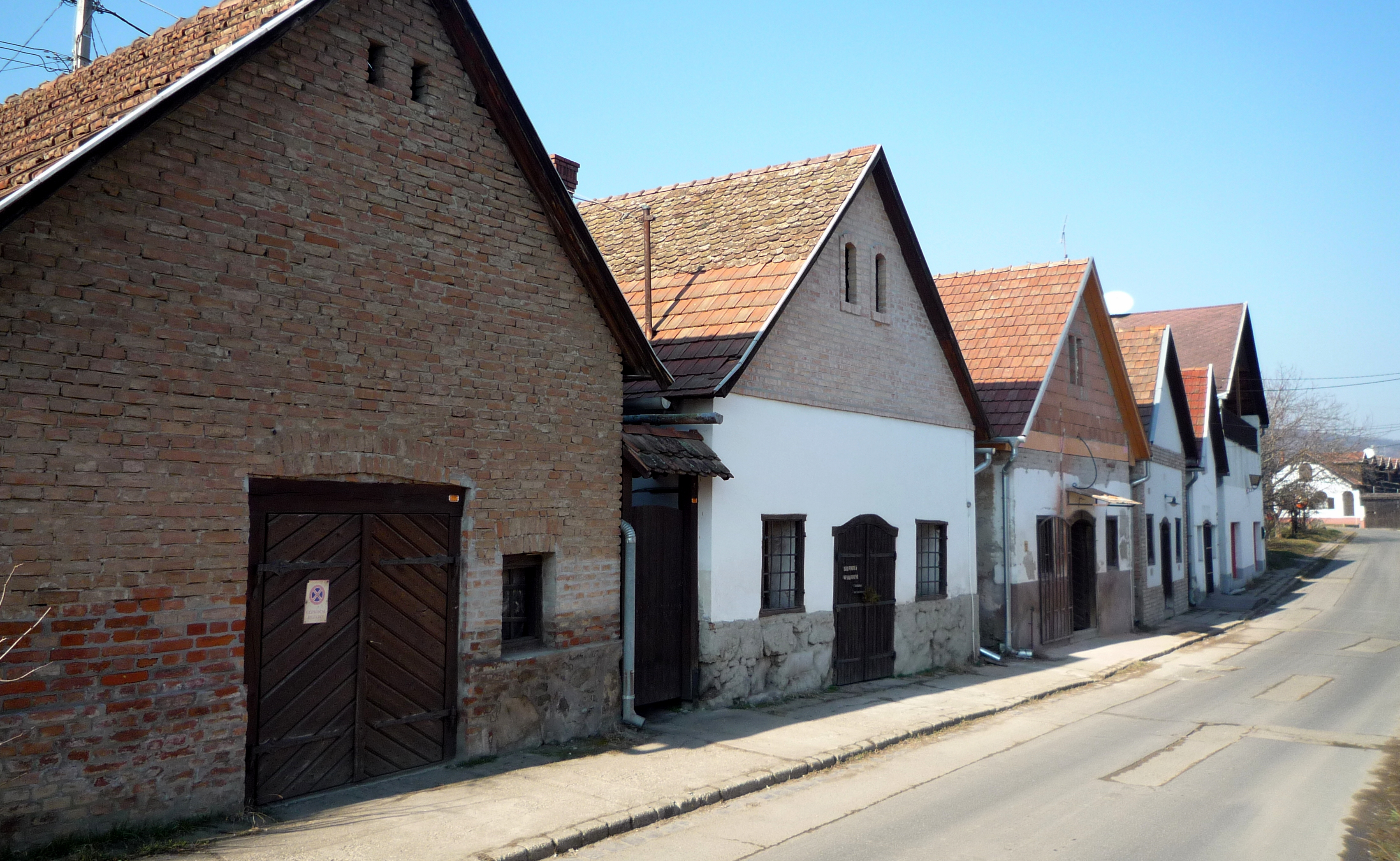 Nagymaros